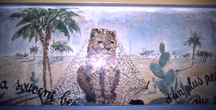 illustration de la fable de Jean de La Fontaine:Le lion et le rat; Livre II Fable XI